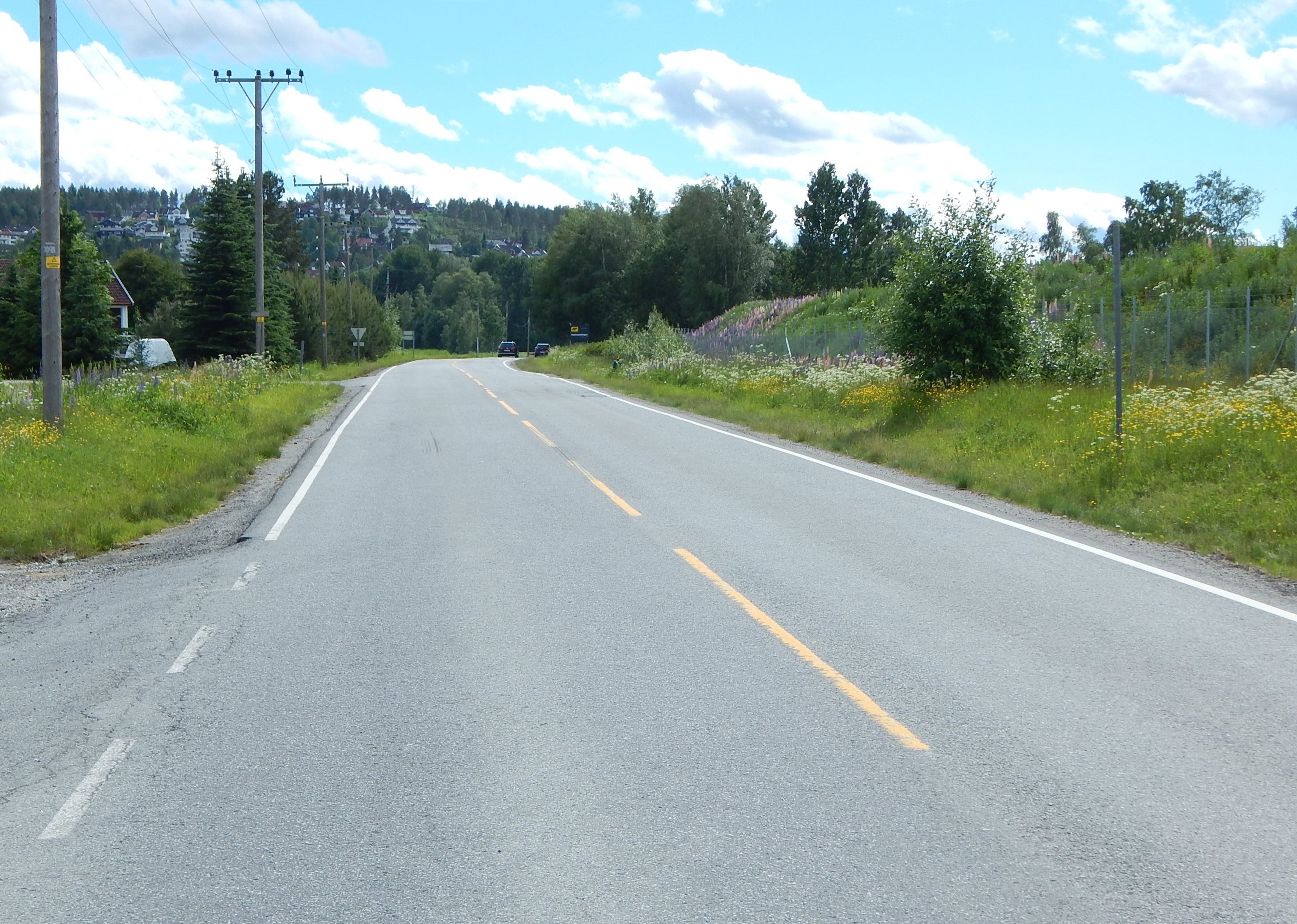 Aulivegen (fylkesvei 476) like ved Betelkirken og krysset med primær fylkesvei 175